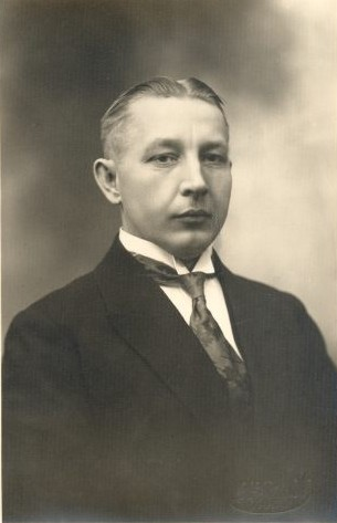 Kaarel Kirde, eesti meteoroloog